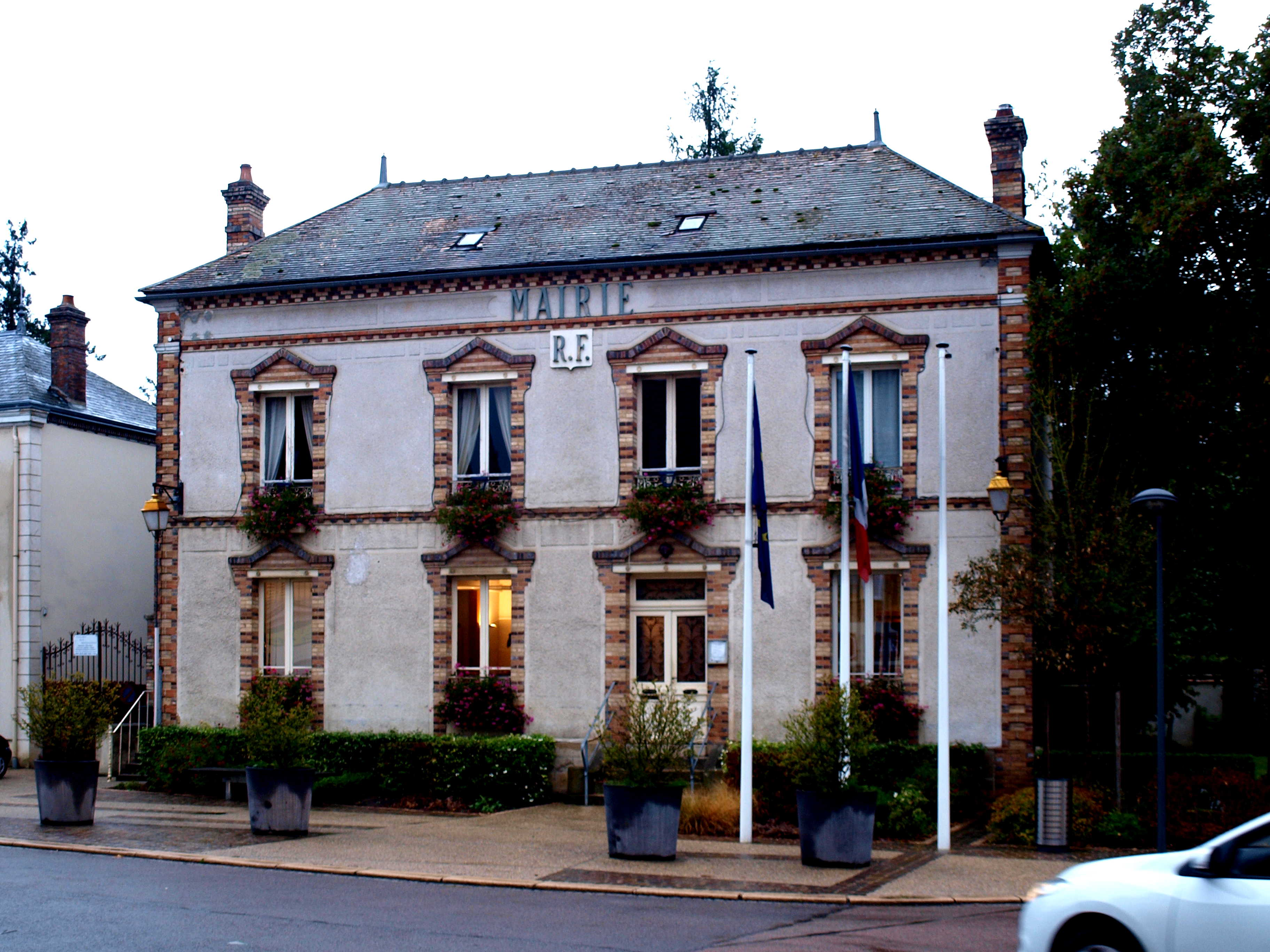 Saint-Valérien (Yonne ; France) ; mairie.